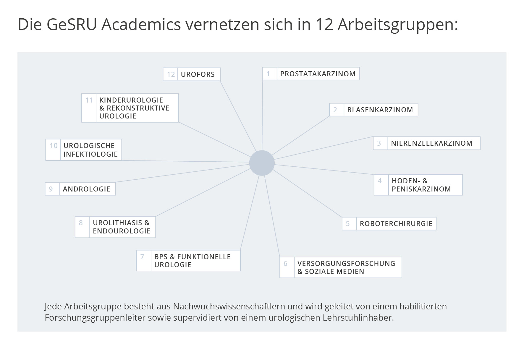 Arbeitsgruppen von GeSRU Academics